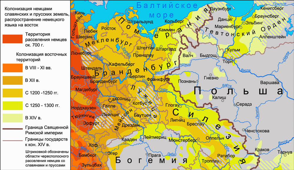 Карта колонизации немецким населением территорий славян и пруссов до XIV века. Источник: Walter Kuhn. Die bäuerliche deutsche Ostsiedlung